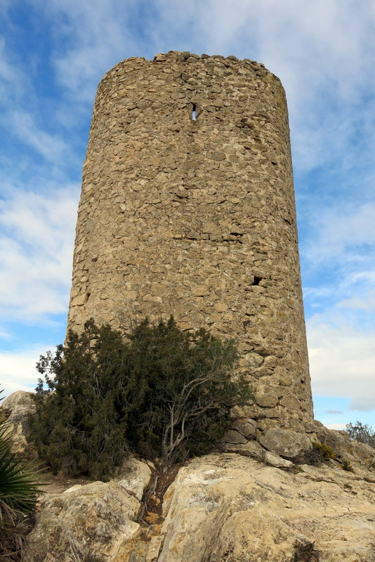 Torre de Montferri, comarca de l'Alt Camp - Catalunya